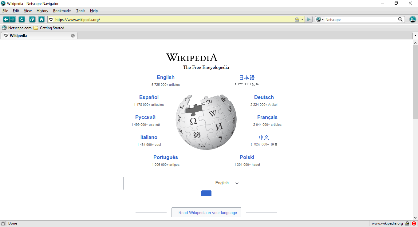 Captura de la última versión de Netscape